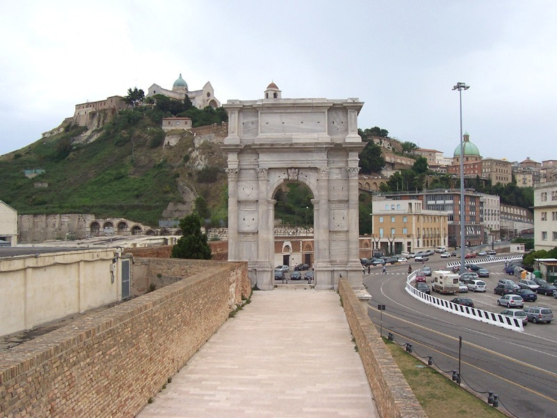 Ancona - Arco di Traiano